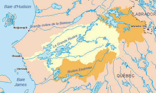 Bassin versant de la Grande Rivière (Québec, Canada). Voyez File:La_Grande_Riviere_carte_2.png pour la mise à jour de 2010. Jaune = bassin original Orange = bassins détournés vers la Grande Rivière.